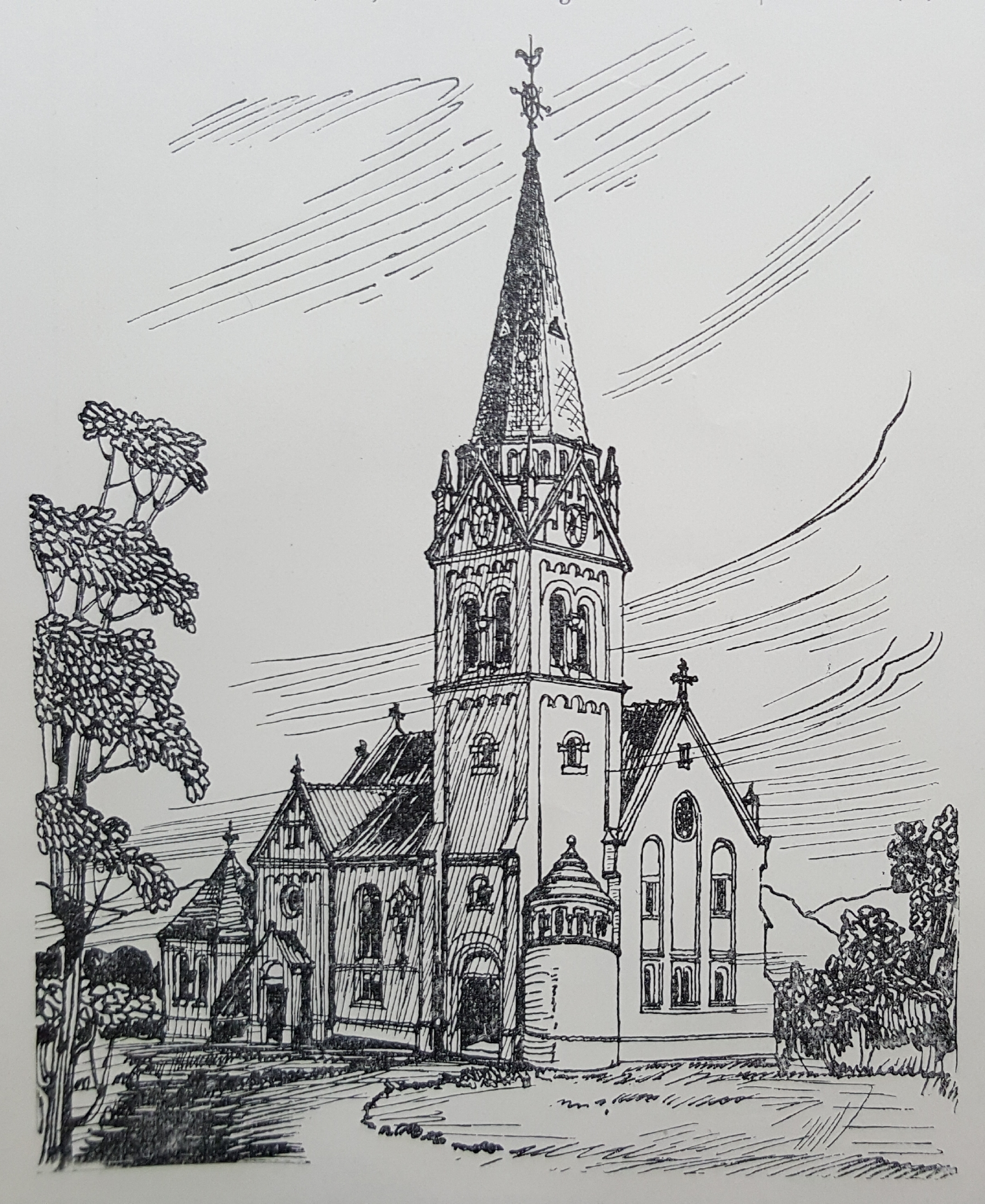 Walddorfhäslach, evangelische Kirche Häslach, Skizze 1900